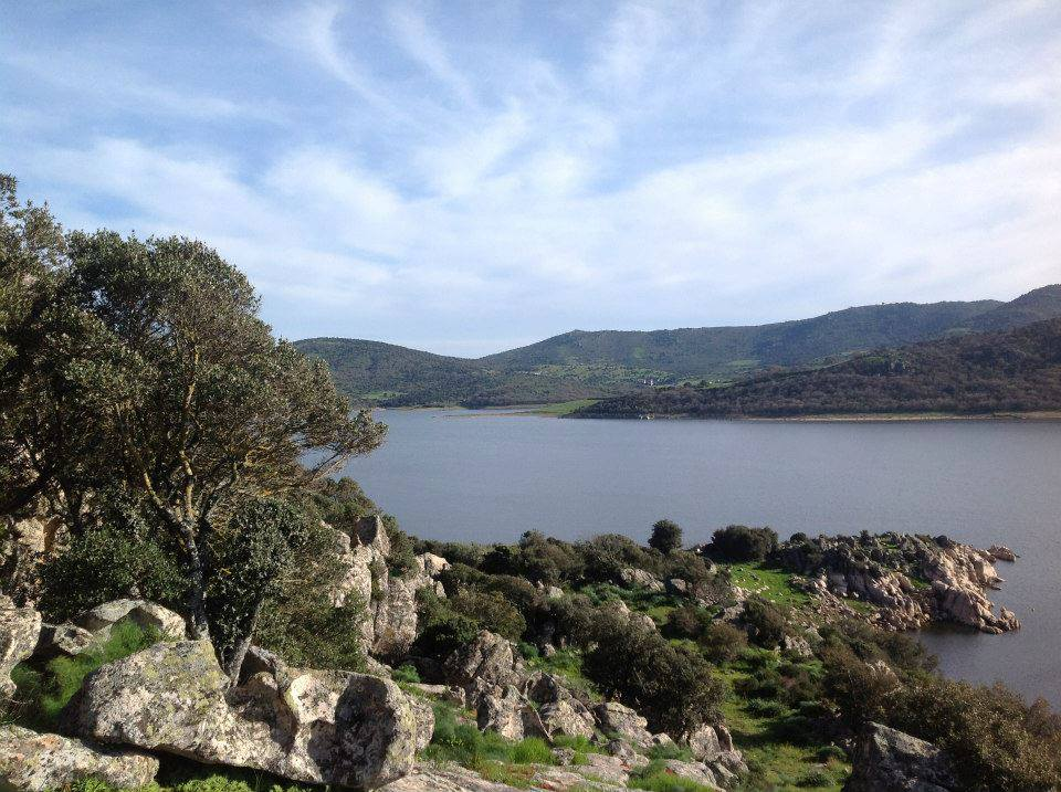 Il Lago Lerno di Pattada